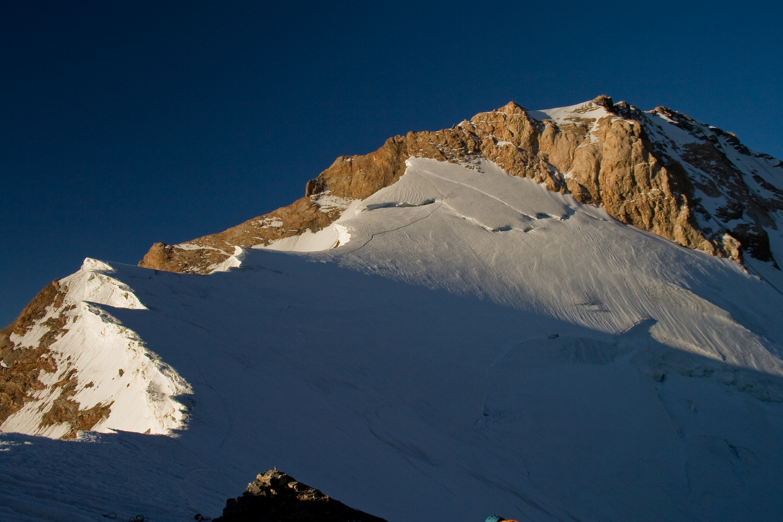 начало подъёма на в. Чимтарга (5494)